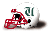 Casco de Barcelona Uruloki